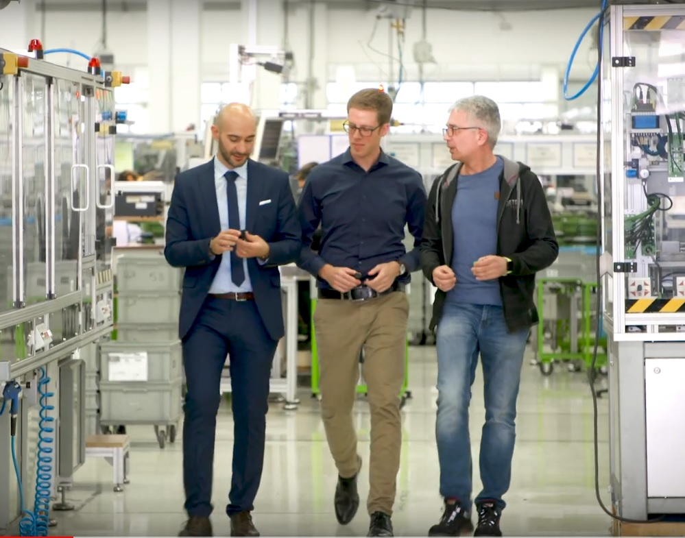 Műszaki menedzser közvetít